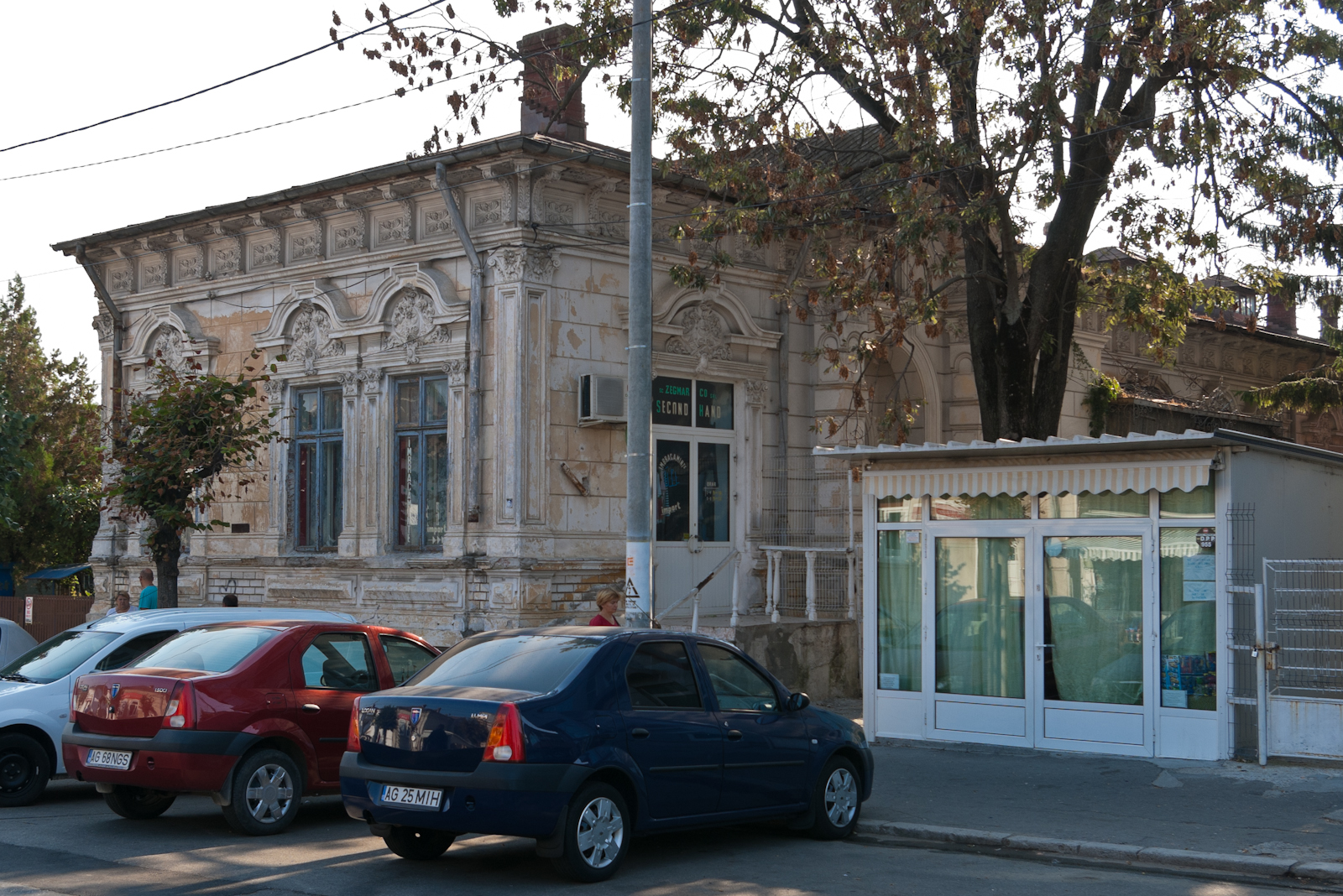 Fotografia prezinta casa de pe str. Crinului nr. 6 din Pitesti, vazuta dinspre NV.